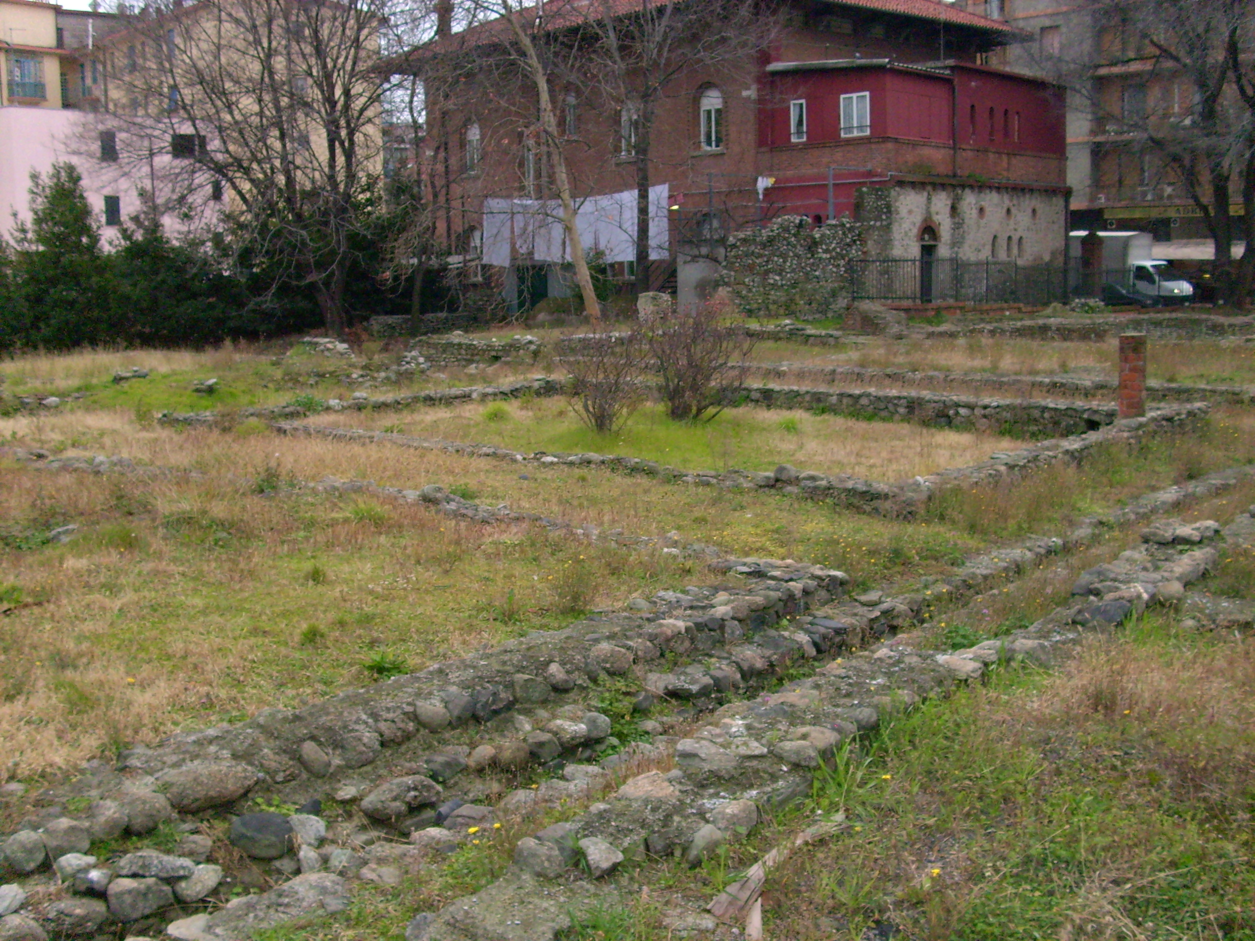 Reperti romani di Albisola Superiore, Liguria, Italy